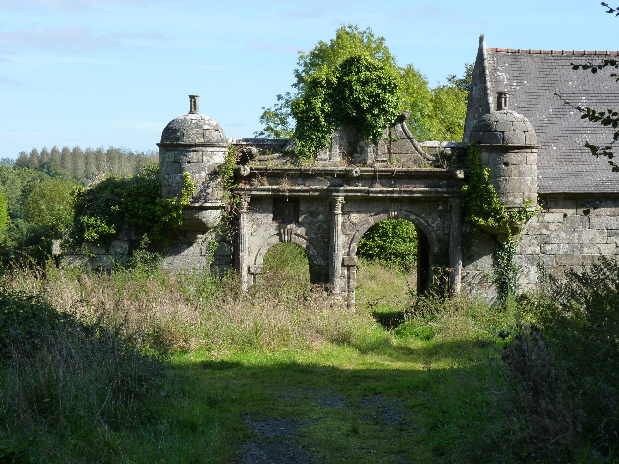 Manoir du XVIème siècle au sud de Plouaret. Détail du portail monumental.